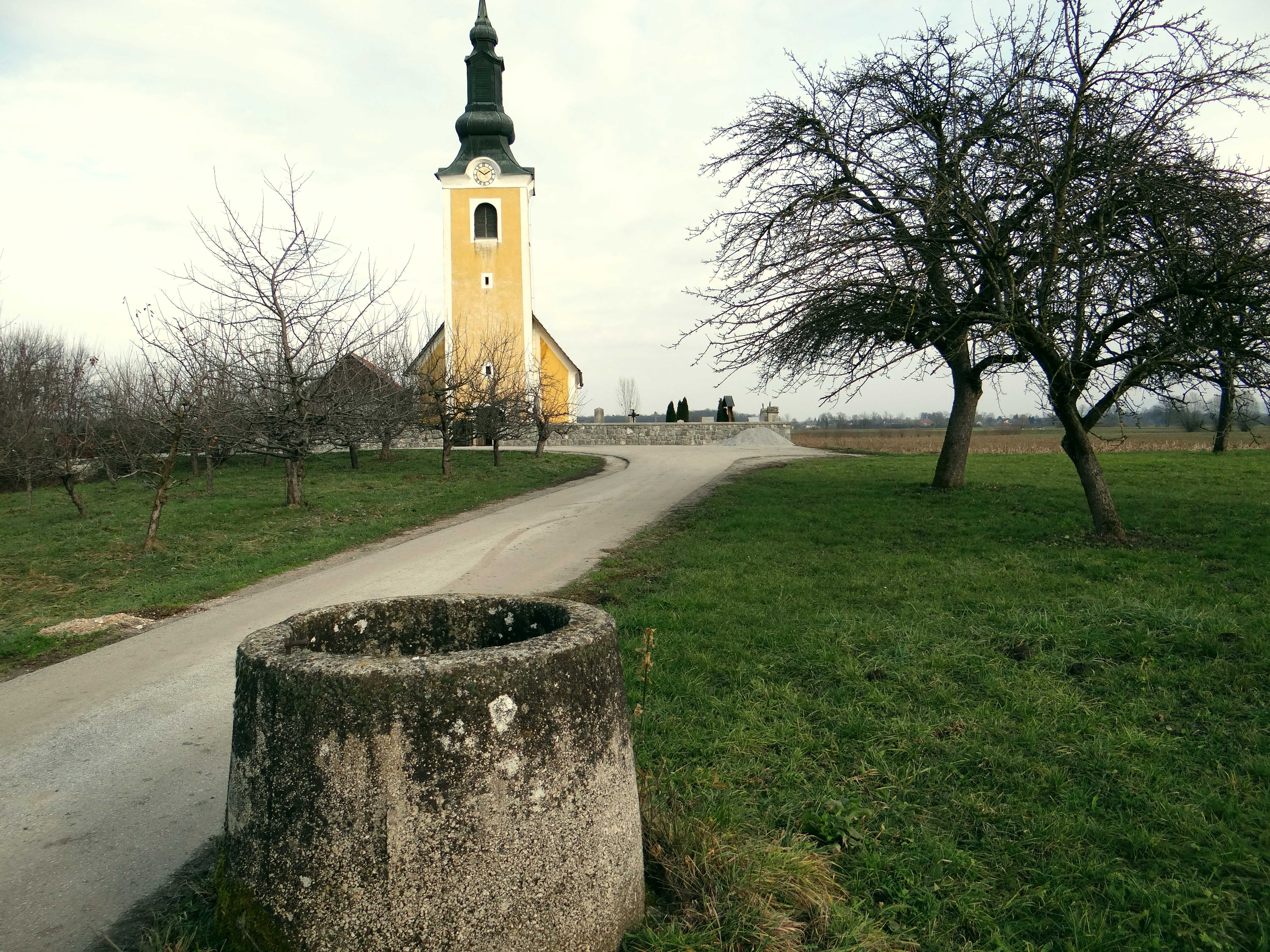 Cerkev Sv. Miklavža in rimski vodnjak v naselju Drama 2013